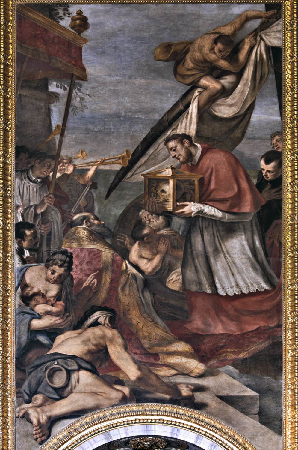 Emilio Taruffi - Arrivo delle reliquie di sant'Andrea in Ancona affresco 1662-65 Sant'Andrea della Valle, Roma